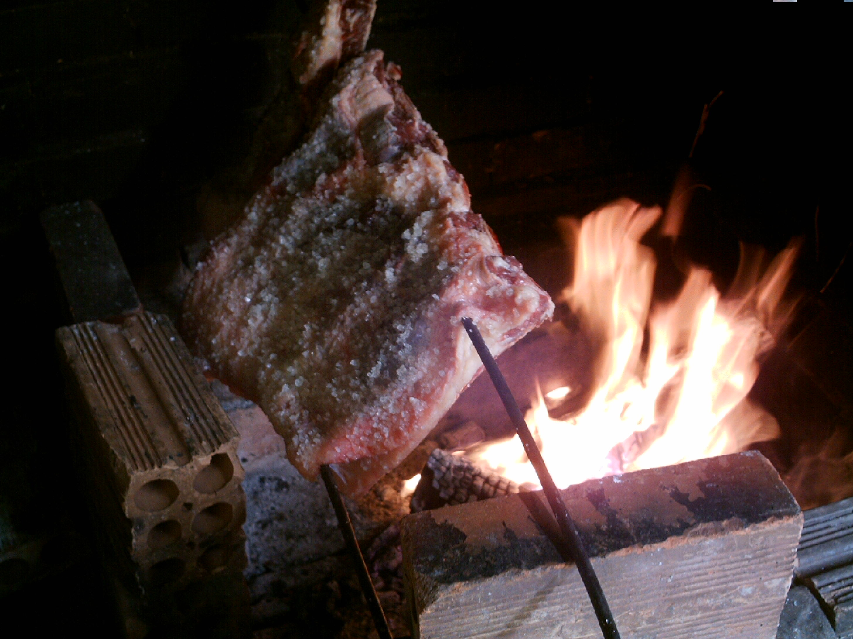 Churrasco brasileiro à base de costela bovina